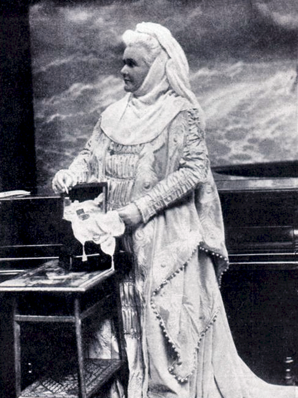 Elisabeth von Rumänien, vor 1914